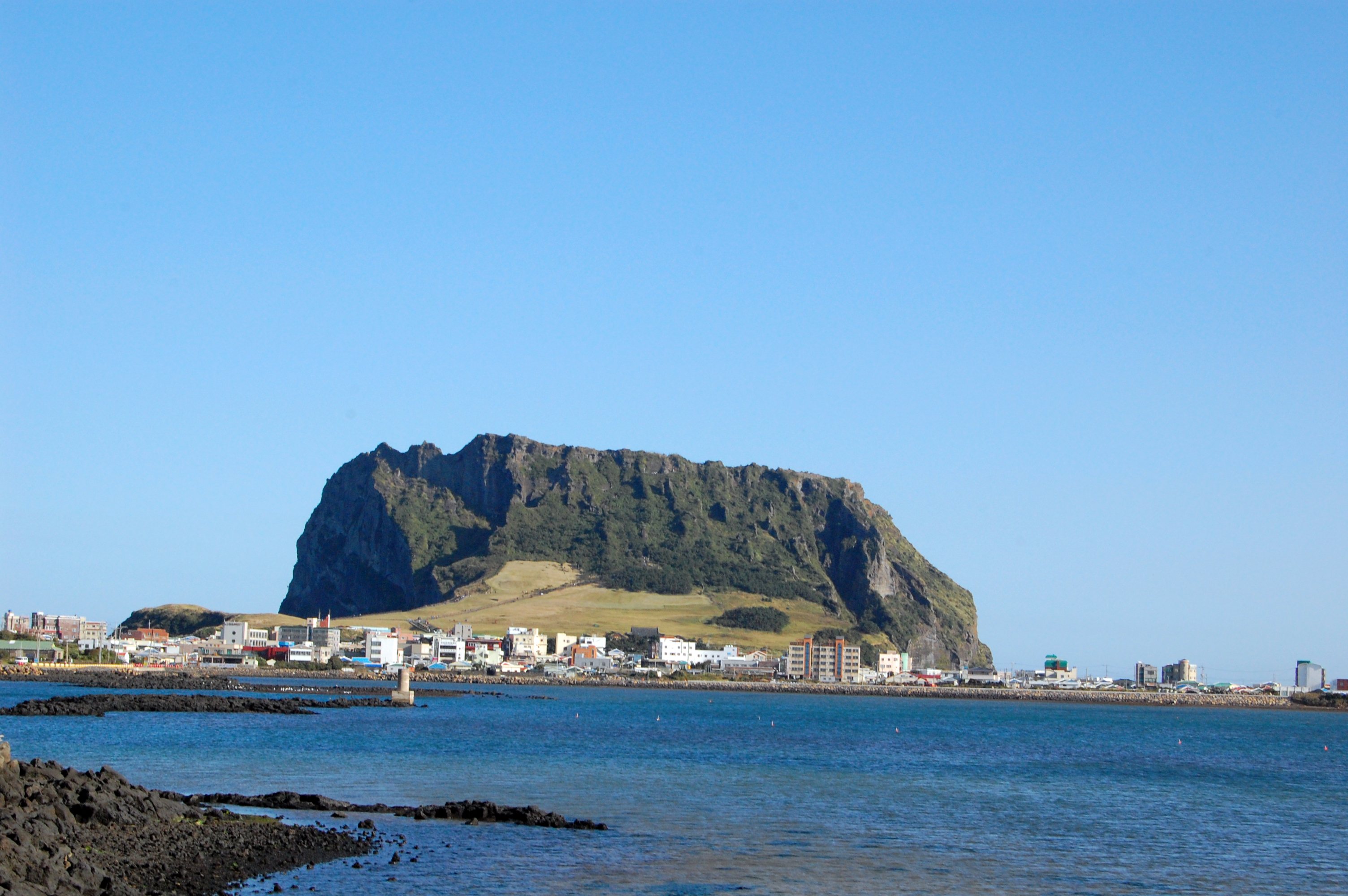 Seongsan-ri and Seongsan Ilchulbong 성산 일출봉